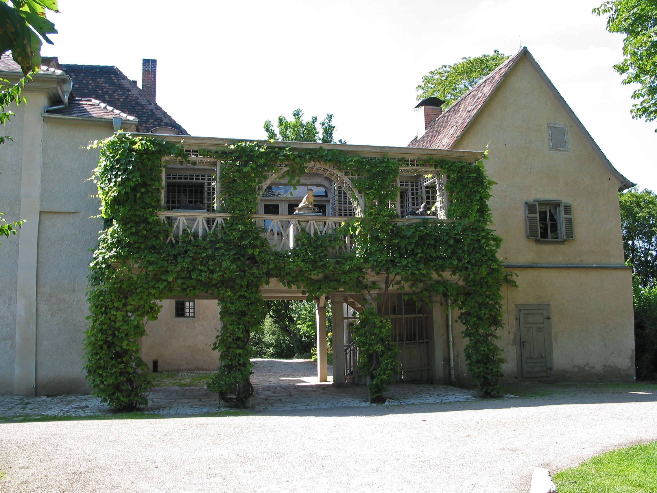 Begrüntes Tor zum Museum Schloss Tiefurt (Ostansicht).